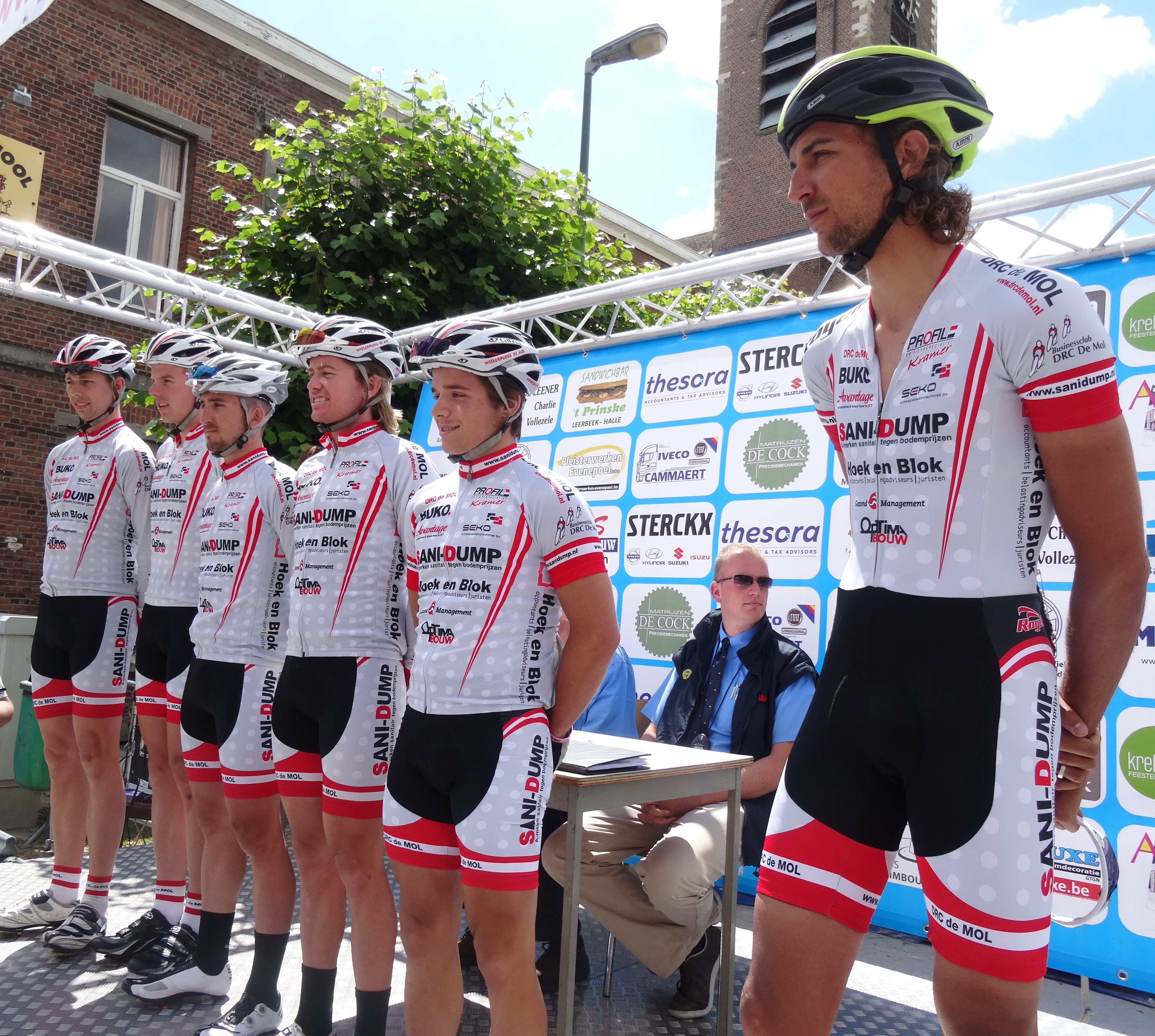 Reportage photographique réalisé le mercredi 25 juin à l'occasion du départ et de l'arrivée de l'Internationale Wielertrofee Jong Maar Moedig 2014 à Oetingen (Gooik), Belgique.